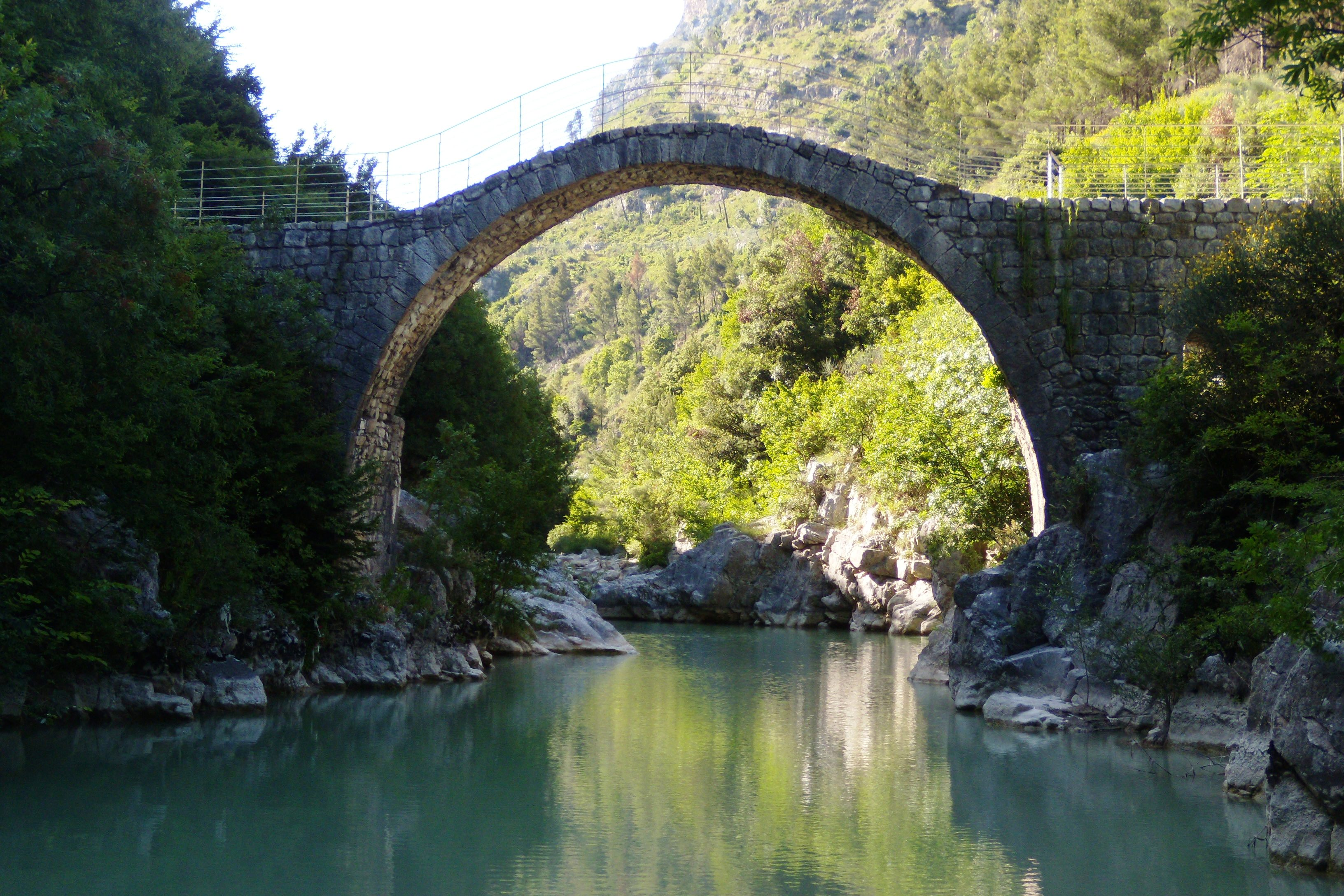 Scorcio del Ponte romano di Annibale in Cerreto Sannita (Bn).